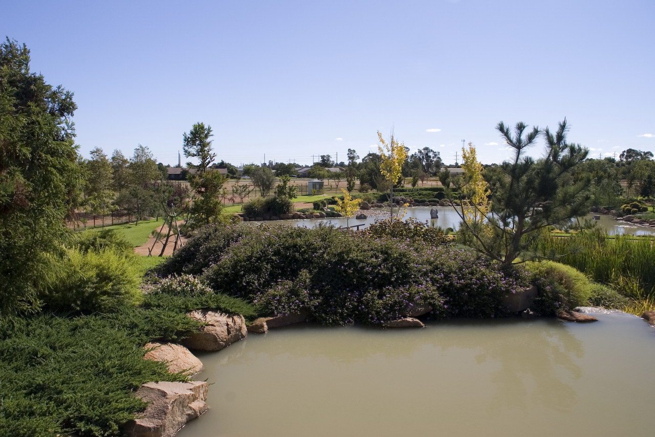 Dubbo, NSW